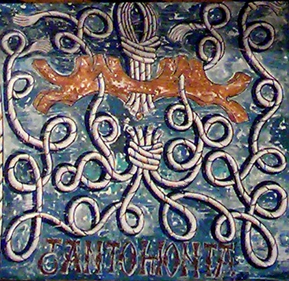 Yugo y nudo gordiano cortado unido al mote o lema TANTO MONTA, emblema que es divisa personal de Fernando II de Aragón y V de Castilla, llamado el Católico. Decoración de una de las salas del Palacio de los Reyes Católicos de la Aljafería de Zaragoza (1488-1492)